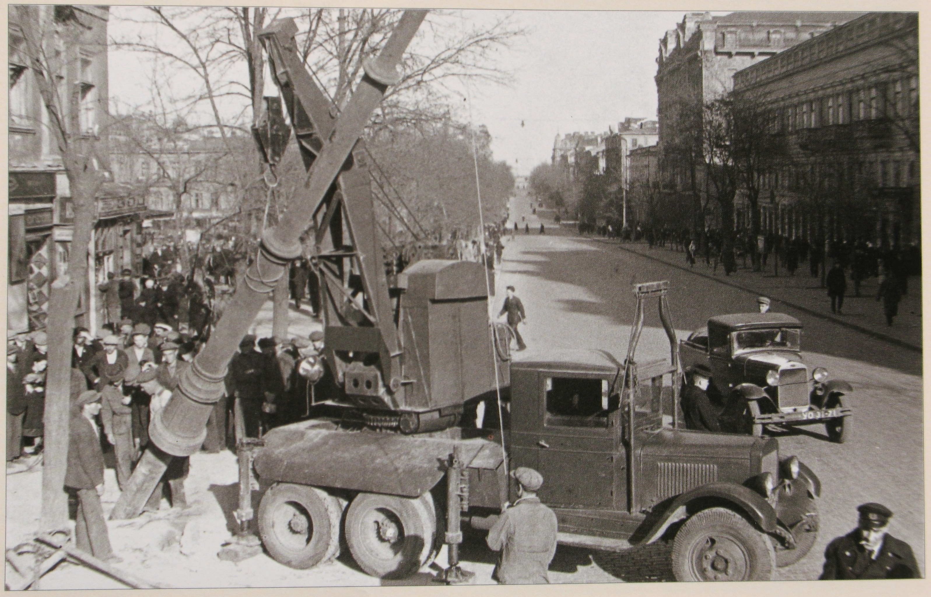 Кран ЗиС-6 устанавливает троллейбусную опору в Одессе на улице Чкалова (Дерибасовской). По улице едет ГАЗ-АА номер УО 31-71.